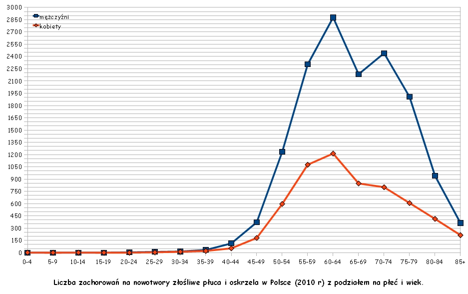 Nowotwór płuca i oskrzela - wykres zachorowalności